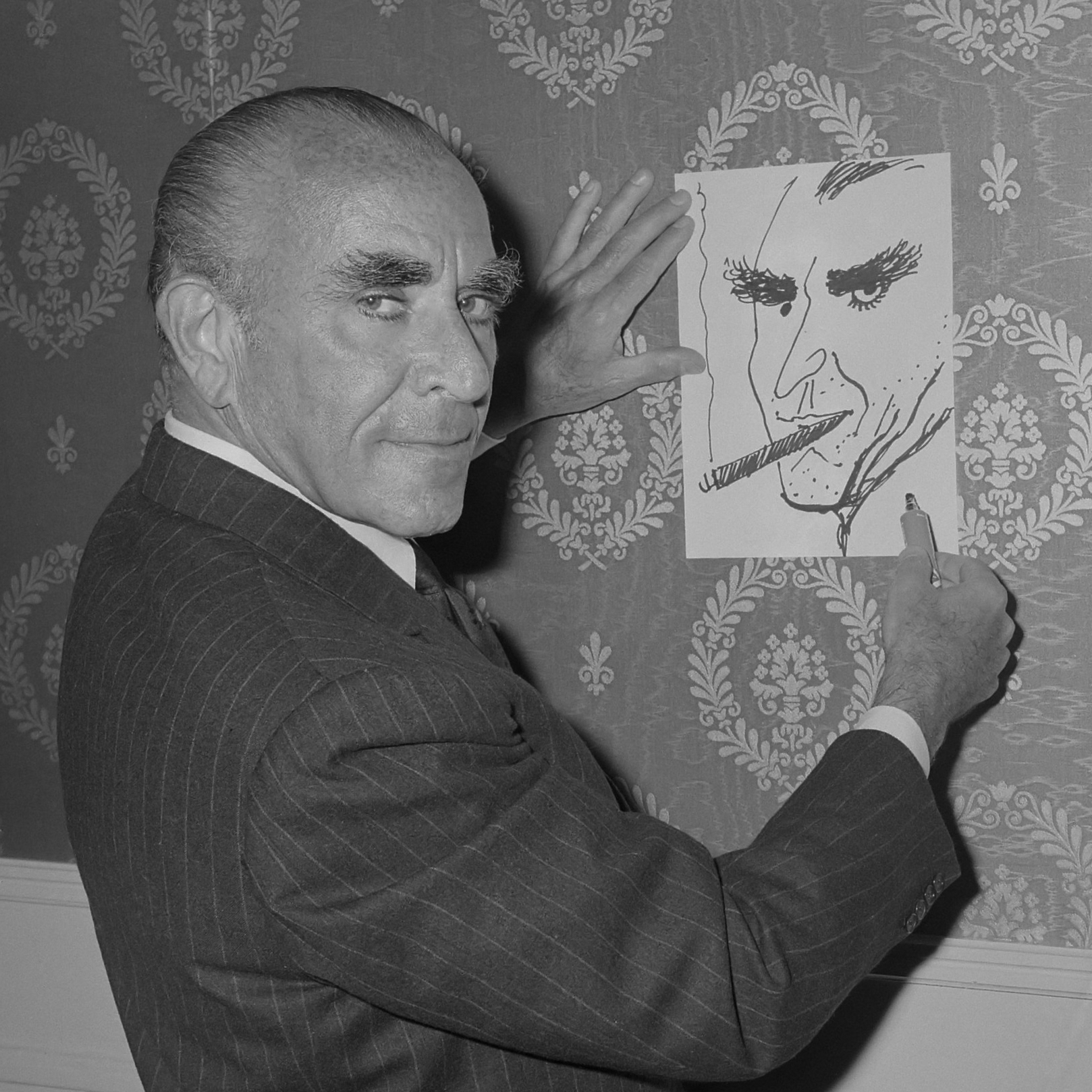 Mr. Albert Dorne stichter en president van Famous Artists Schools uit Amerika in Victoria Hotel te Amsterdam 27 mei 1963